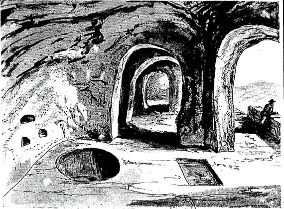 Baptistère dans la partie troglodyte de l'abbaye de Marmoutier, avec la piscine d'immersion à gauche et le puits à droite